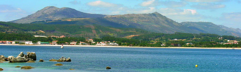 Serra do Barbanza, dende Ribeira, Galicia